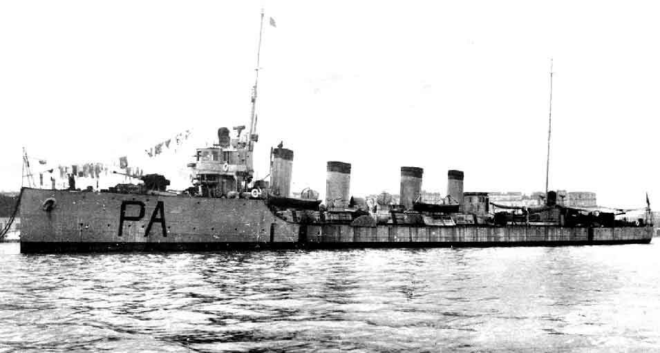 Der italienische Zerstörer Pola ex SMS Orjen